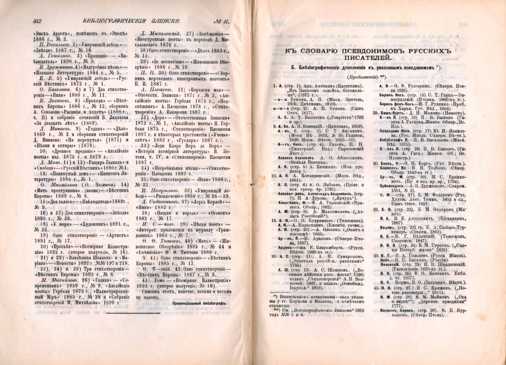 "Ксловарю псевдонимов русских писателей"